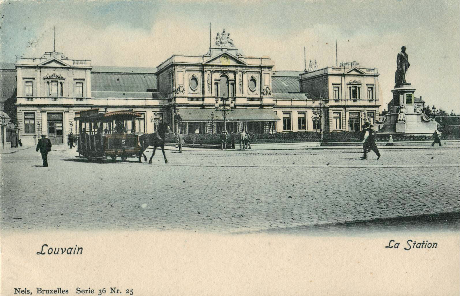 Carte postale ancienne éditée par Nels à Bruxelles, Série 36, n°25 :Louvain - La Station